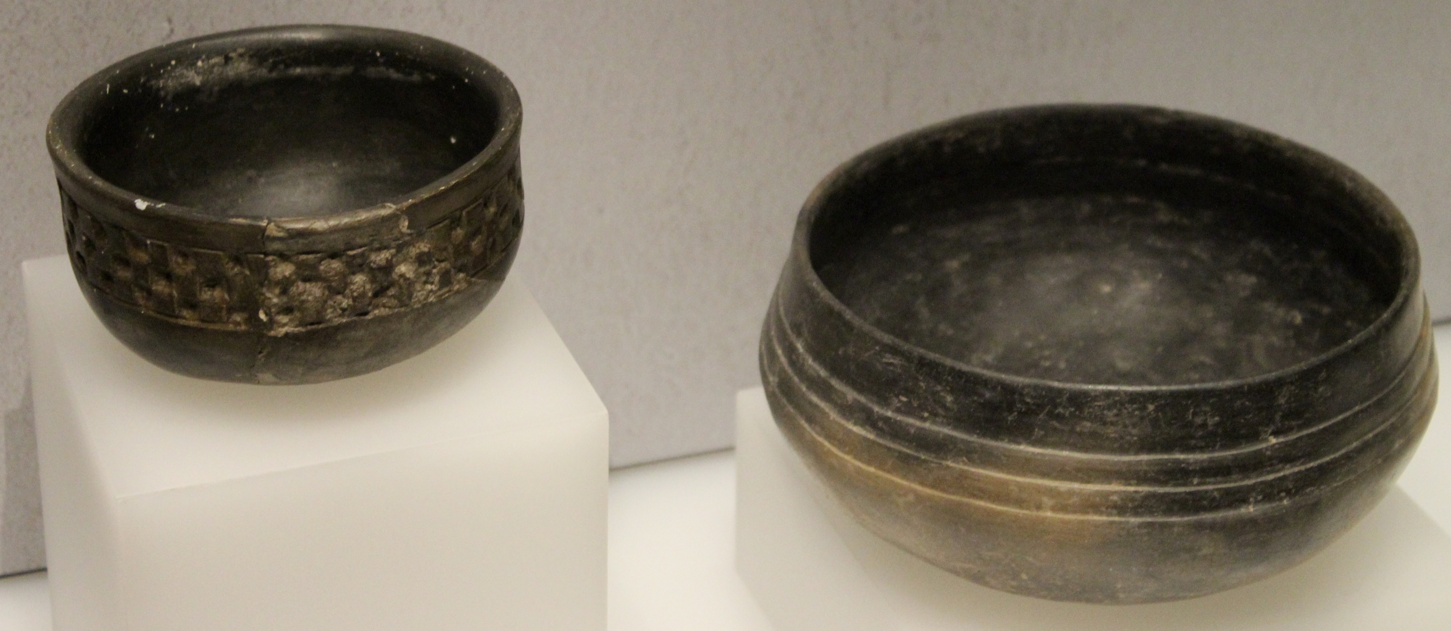 Madrid, M.A.N. Cerámica tartésica.